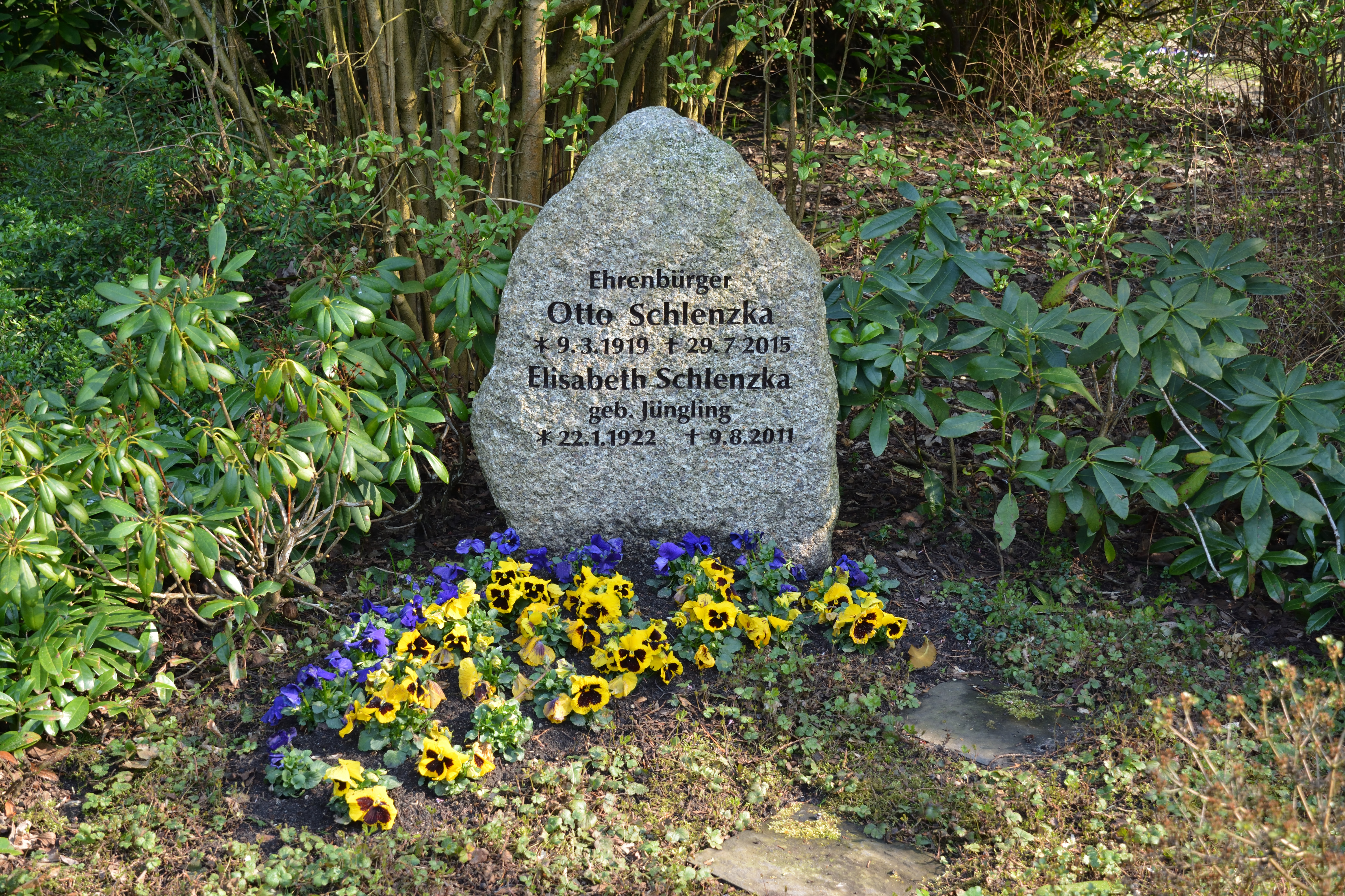 Impressionen vom Nordfriedhof in Kiel: Grab von Otto Schlenzka